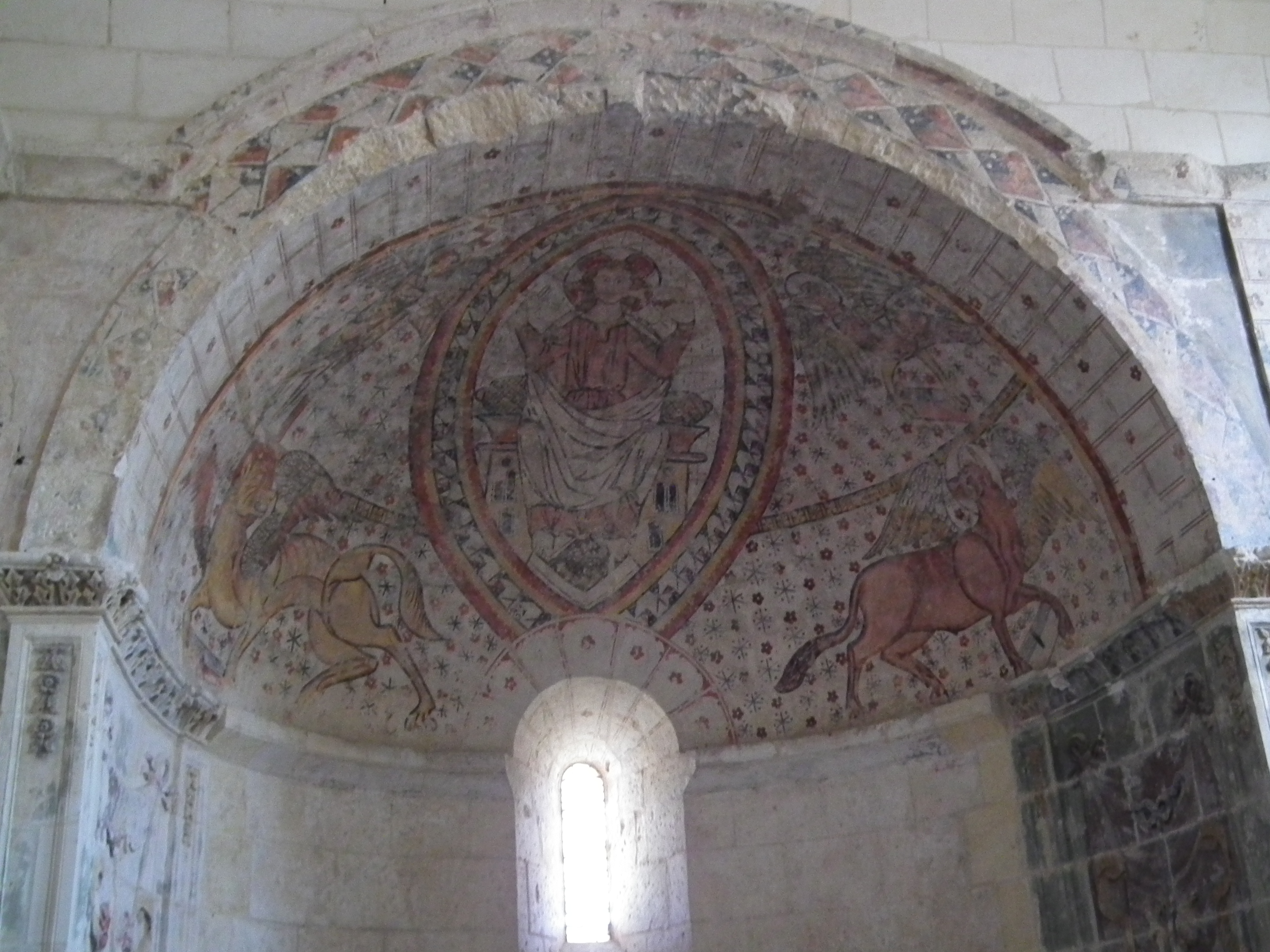 Fresque médiévales, absidiole sud, église de Tanzac